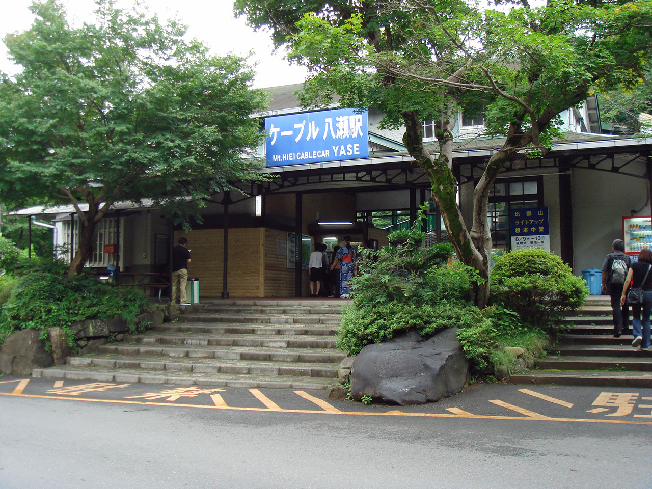 京福電気鉄道鋼索線ケーブル八瀬駅駅舎